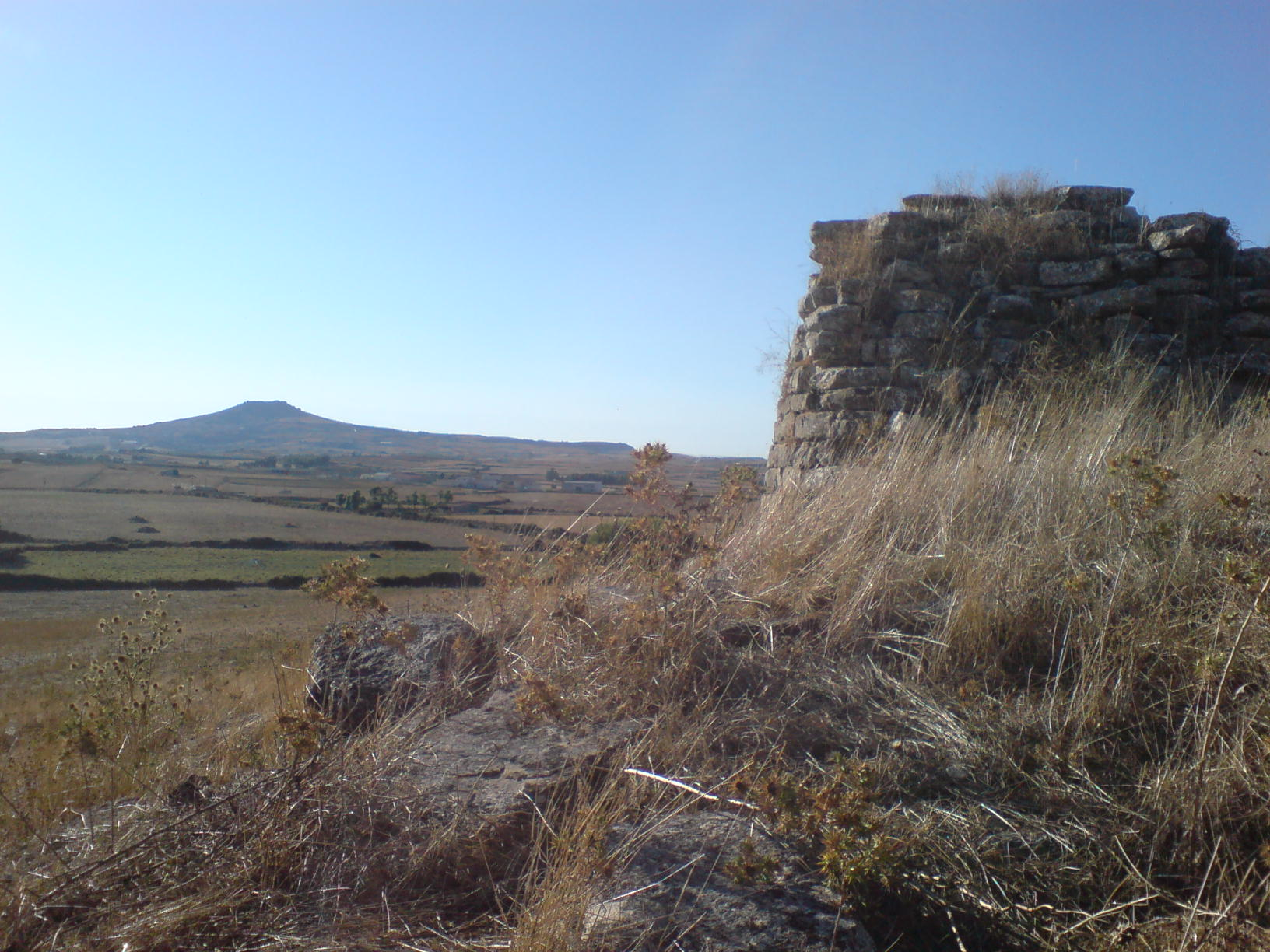 Nuraghe sito in Nuragus campagne di Coni foto eseguita da Gianluca Sanna